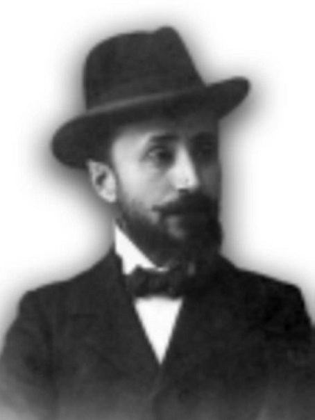 Sigismondo Nardi